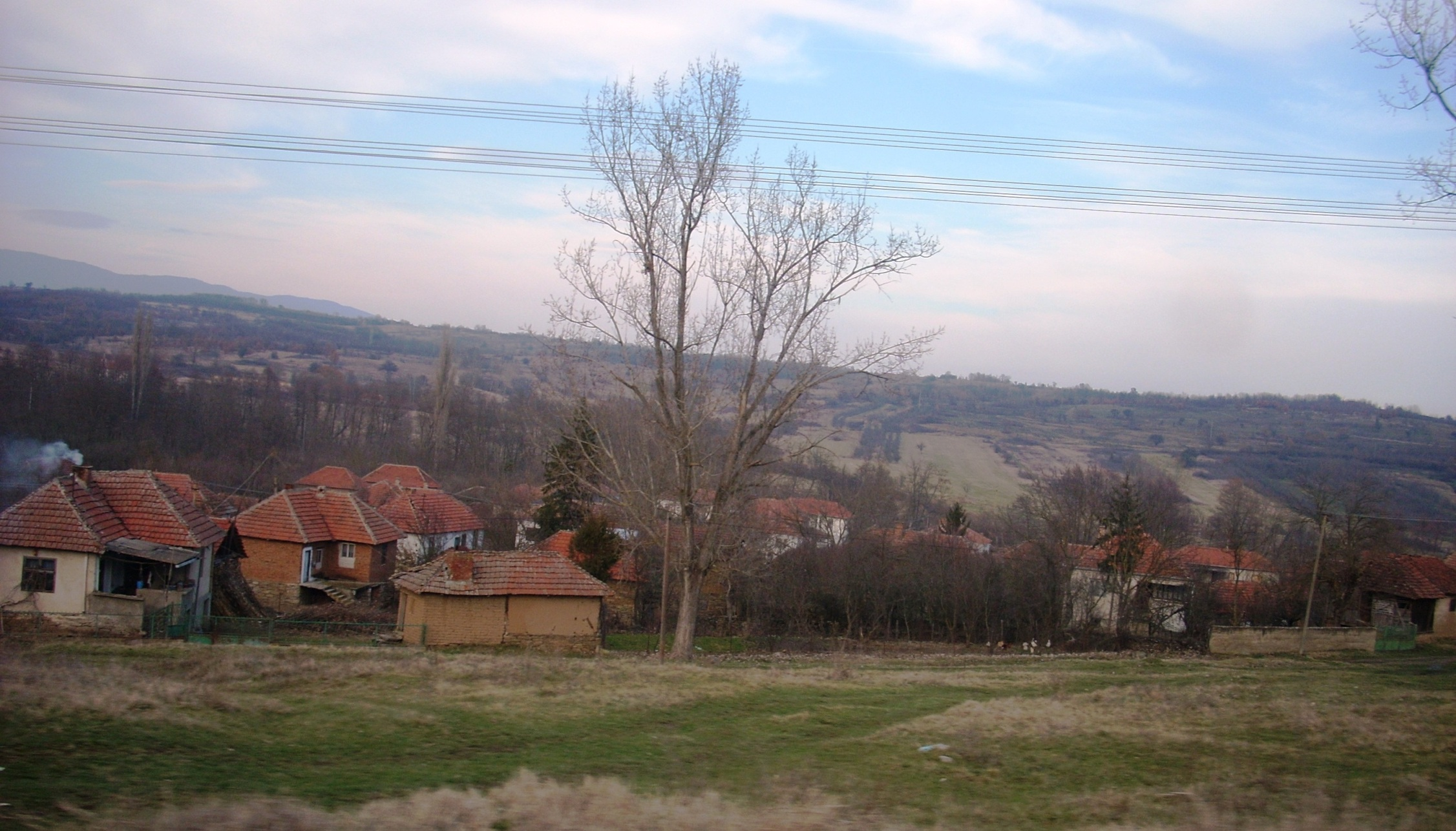 Брестовац (Бојник) - Brestovac (Bojnik)